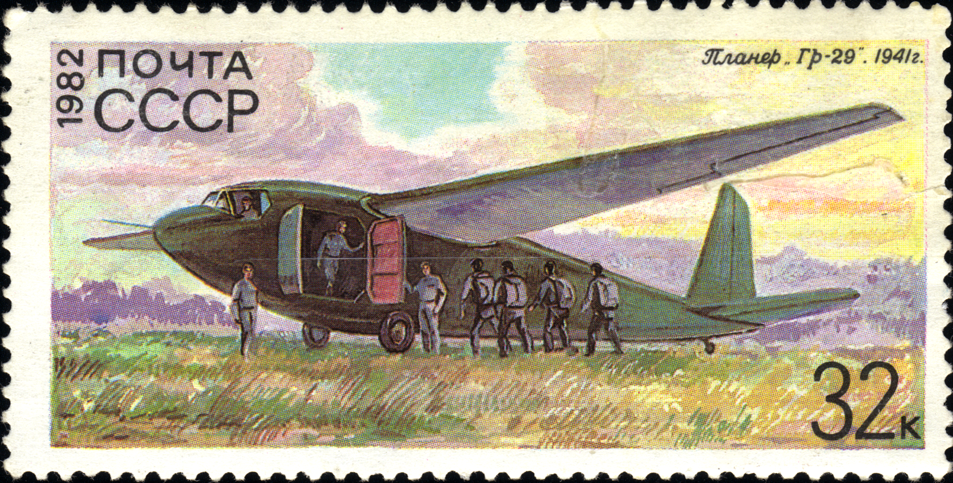 Марка Почты СССР.